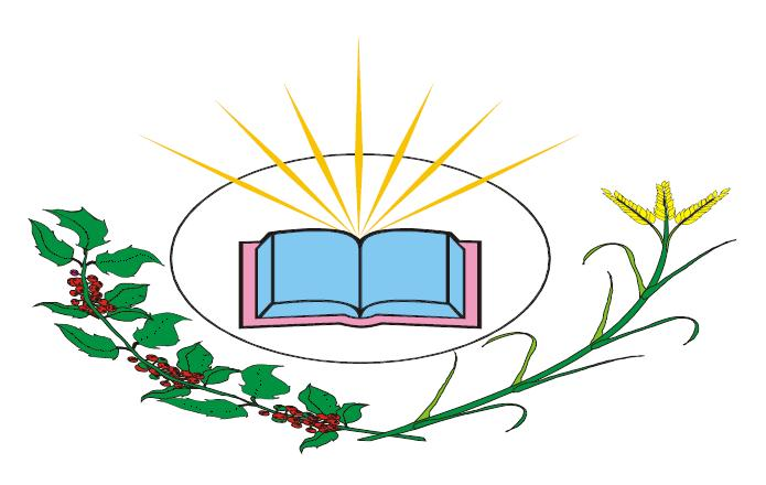 Brasão do município de Catalão, em Goiás